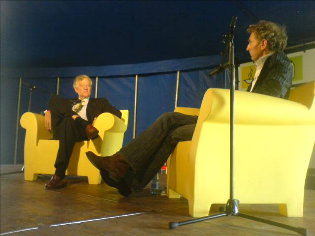 Paul Rosenmöller (rechts) tijdens het Verdrag van Schokland